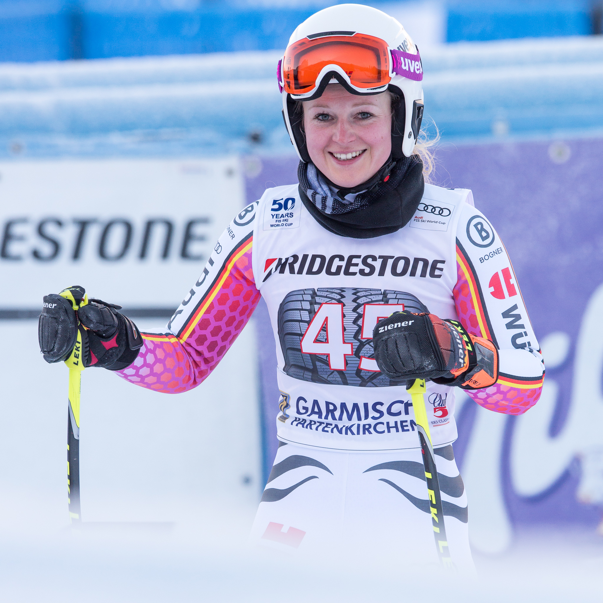 64. Kandahar Rennen,Audi FIS Ski Weltcup Garmisch-Partenkirchen,Damen Abfahrt,Kandahar,Ladies Downhill,Patrizia Dorsch